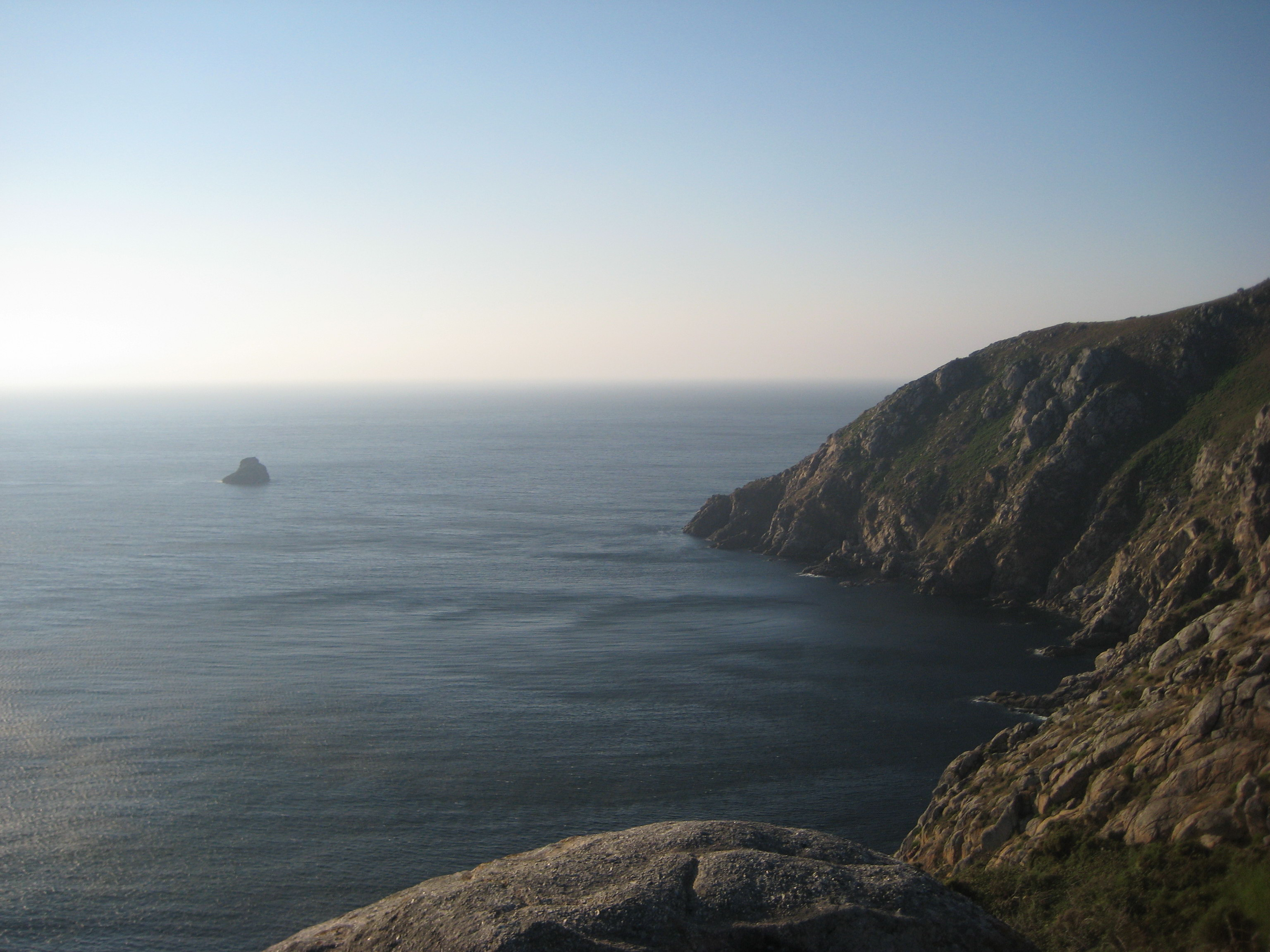 Cabo Fisterra. Galicia (Spain)